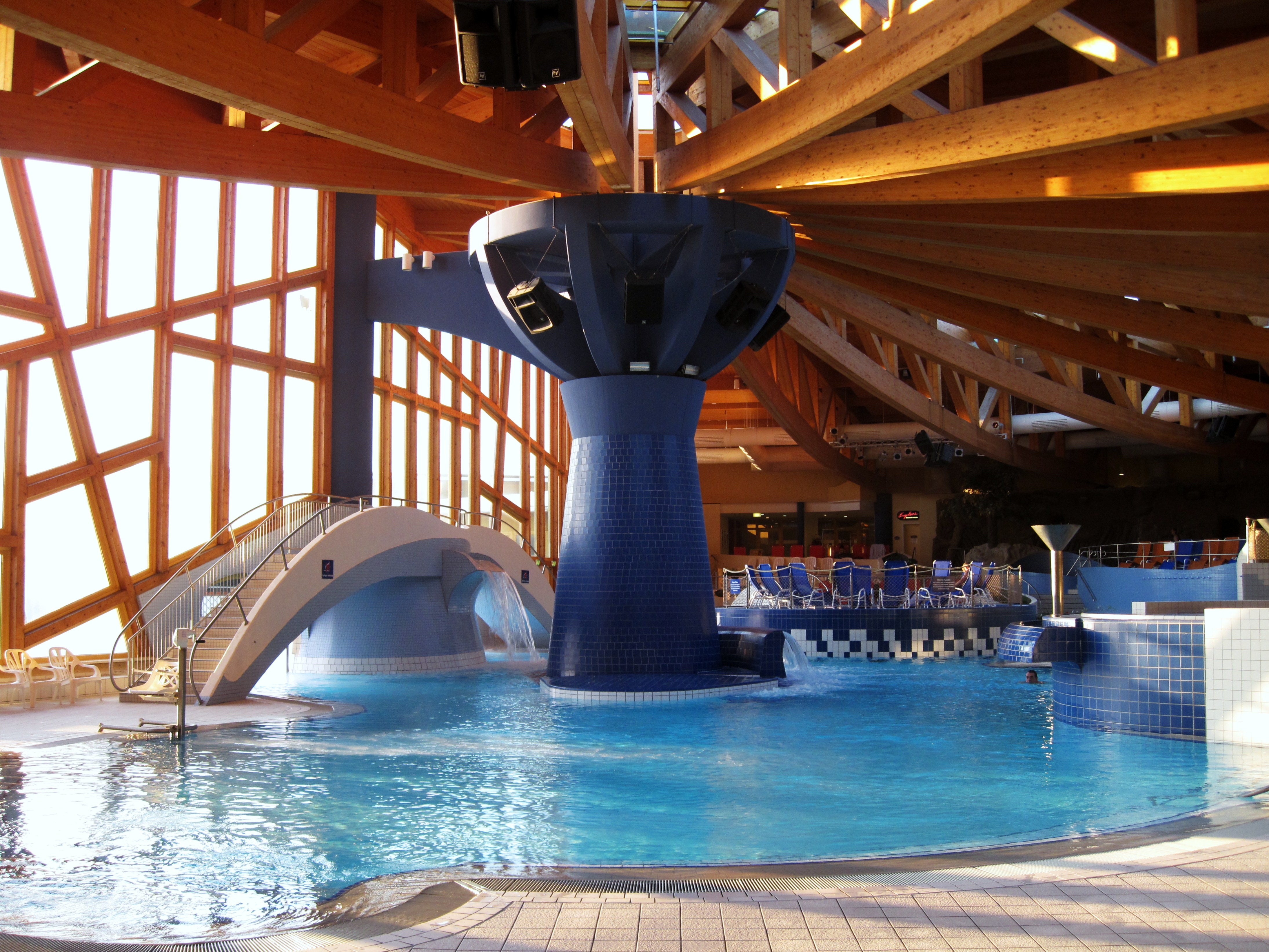 Badelandschaft in der NaturTherme Templin, Templin, Uckermark, Brandenburg, Deutschland